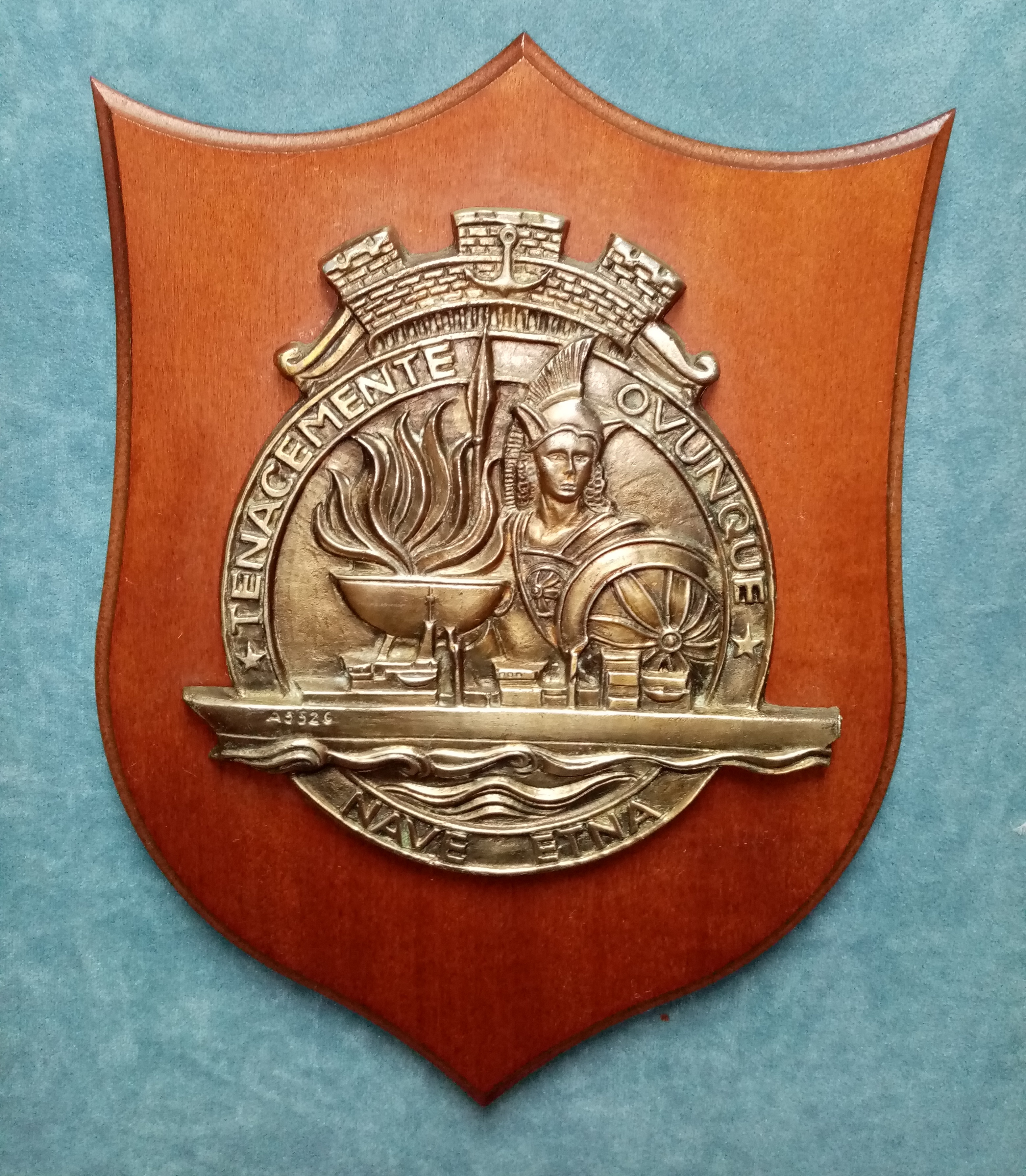 Crest della nave rifornitrice "Etna" della Marina Militare Italiana